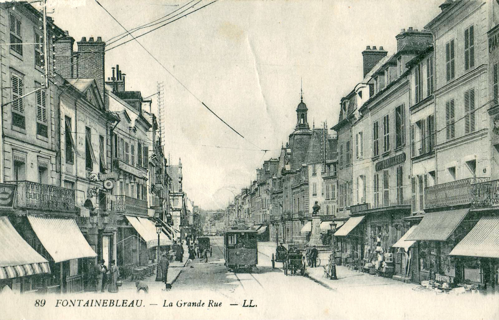 Carte postale ancienne éditée par LL, n°89 : FONTAINEBLEAU - La Grande Rue